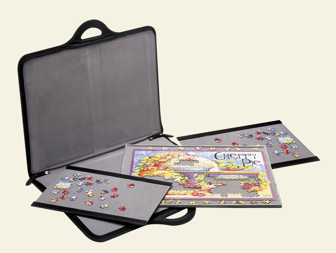 Jigsort